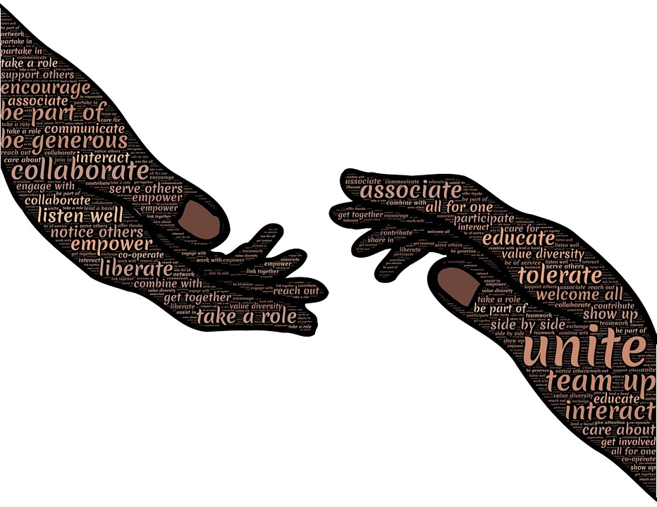 solidarité